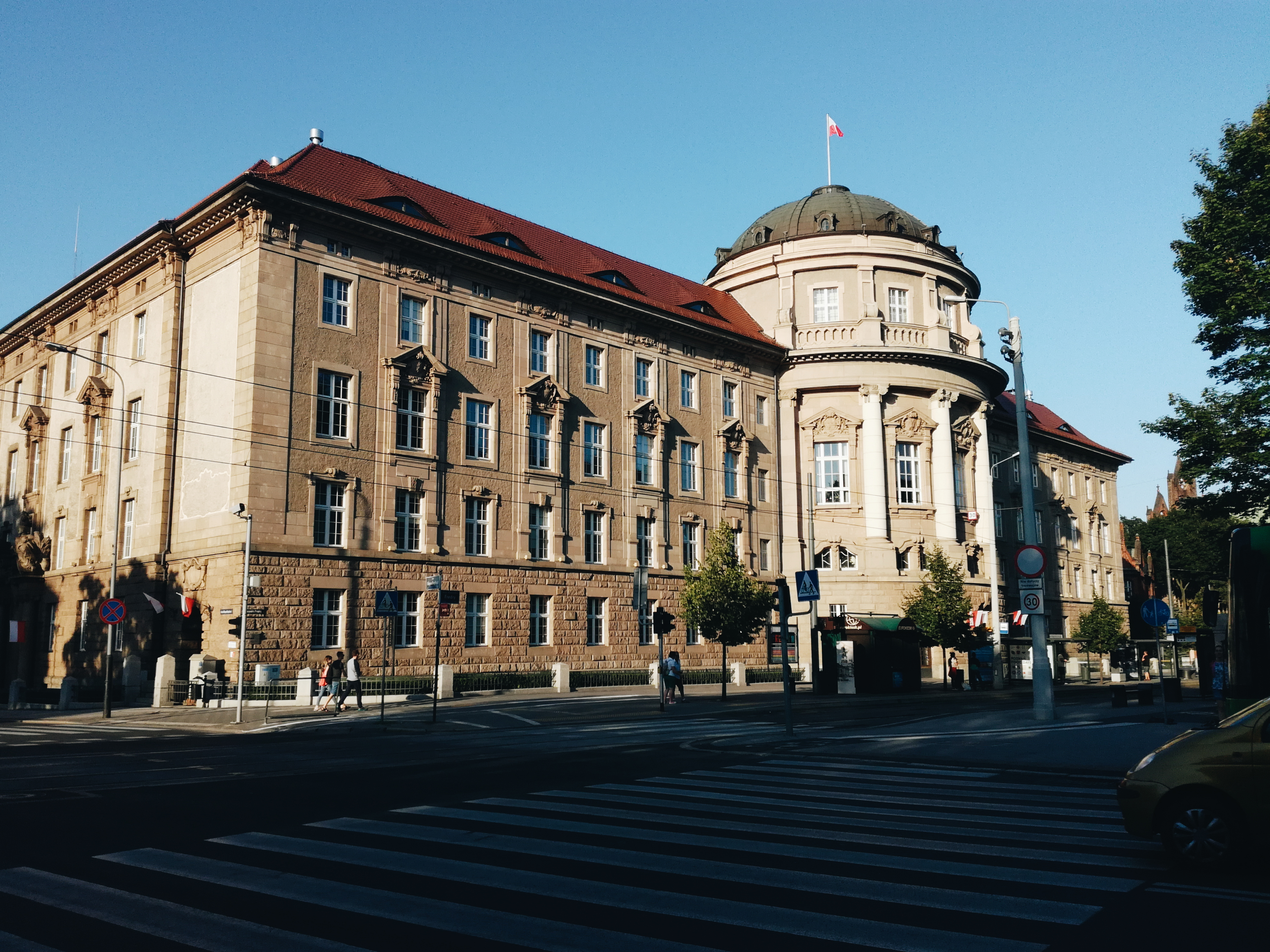 Poznań, Gmach Pruskiej Komisji Kolonizacyjnej, ob. Collegium Maius - Akademia Medyczna Wikidata has entry Q33046126 with data related to this item.